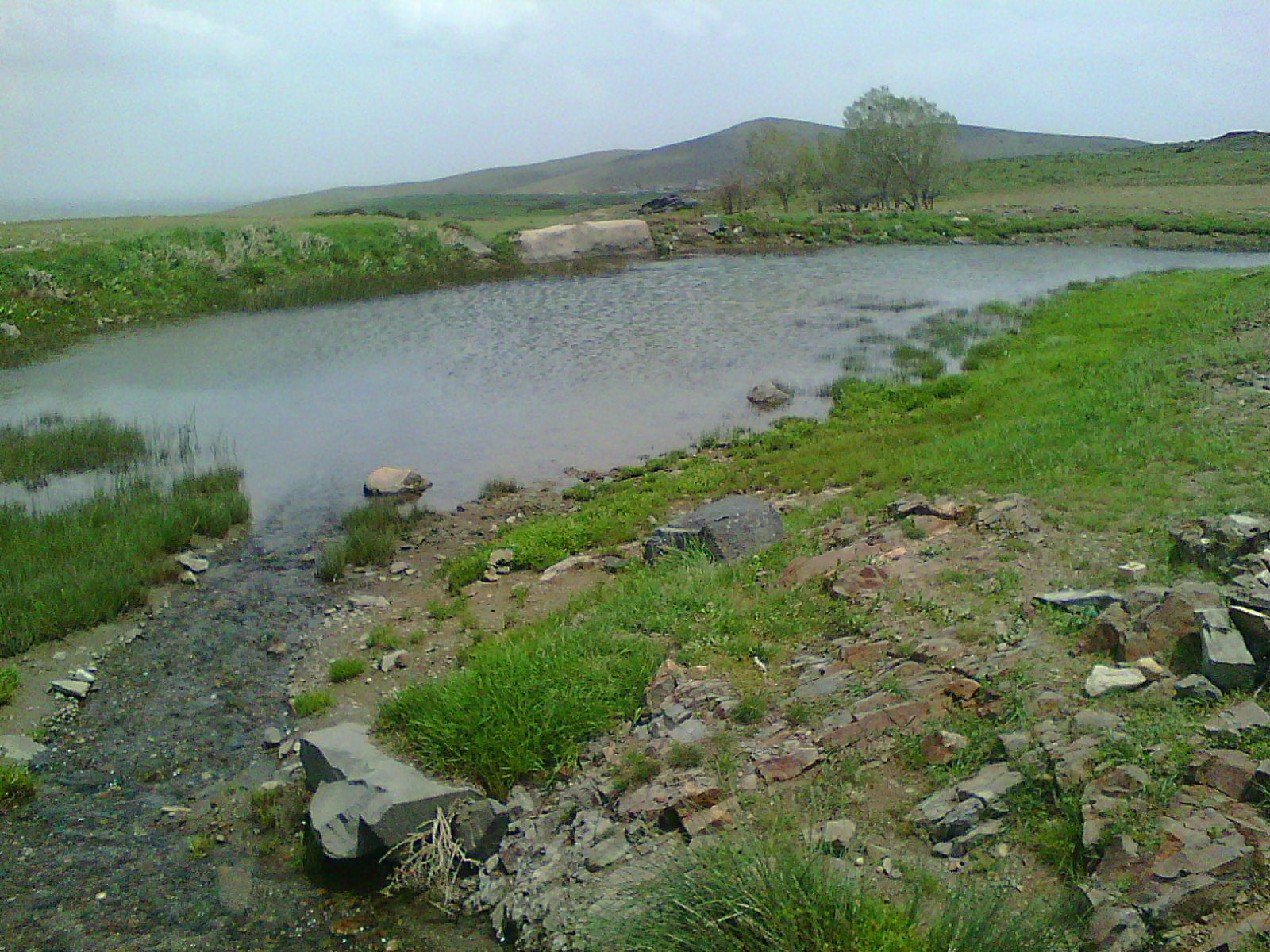 برکه یا آبگیر